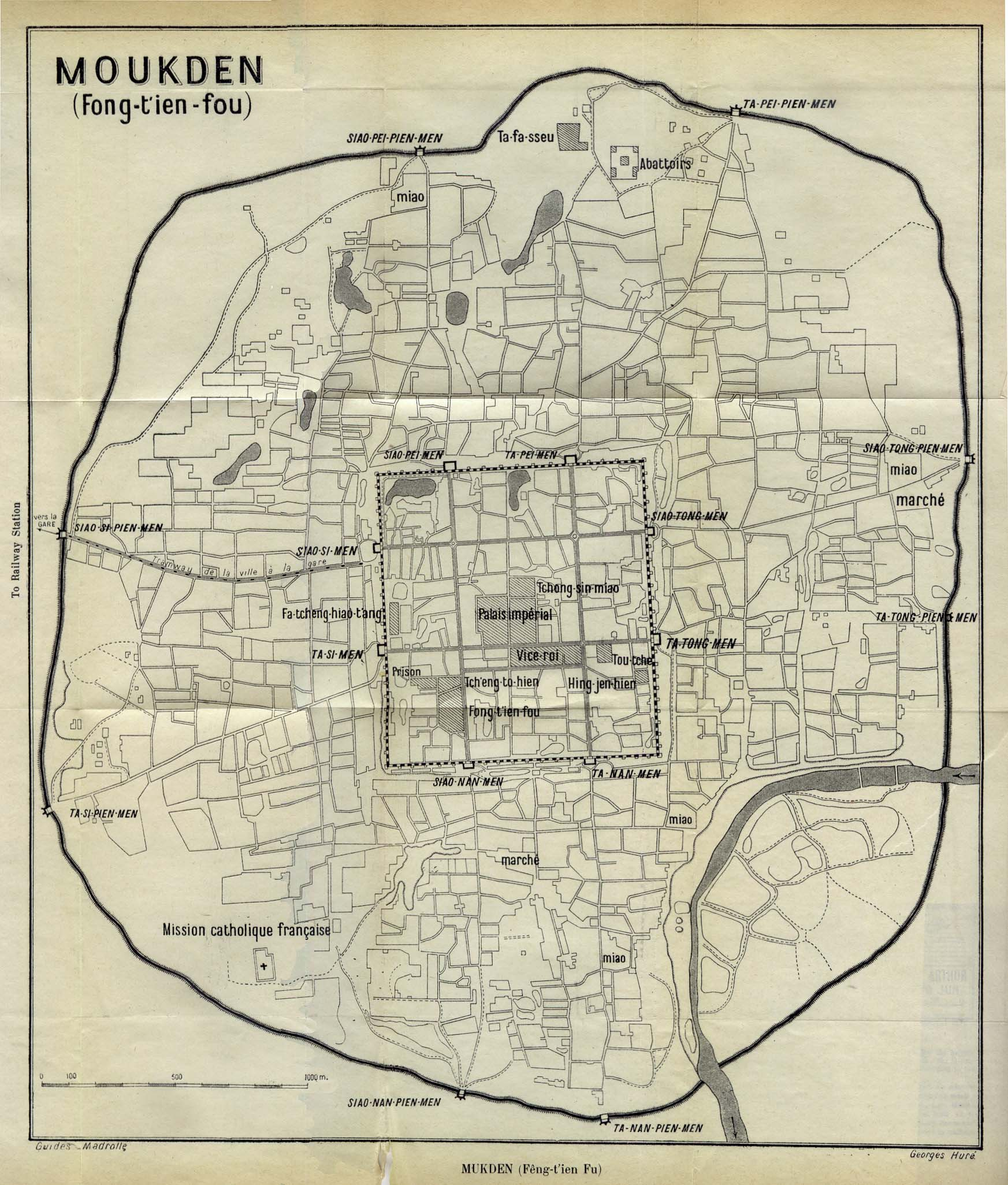 中文（中国大陆）: 1912年沈阳市地图